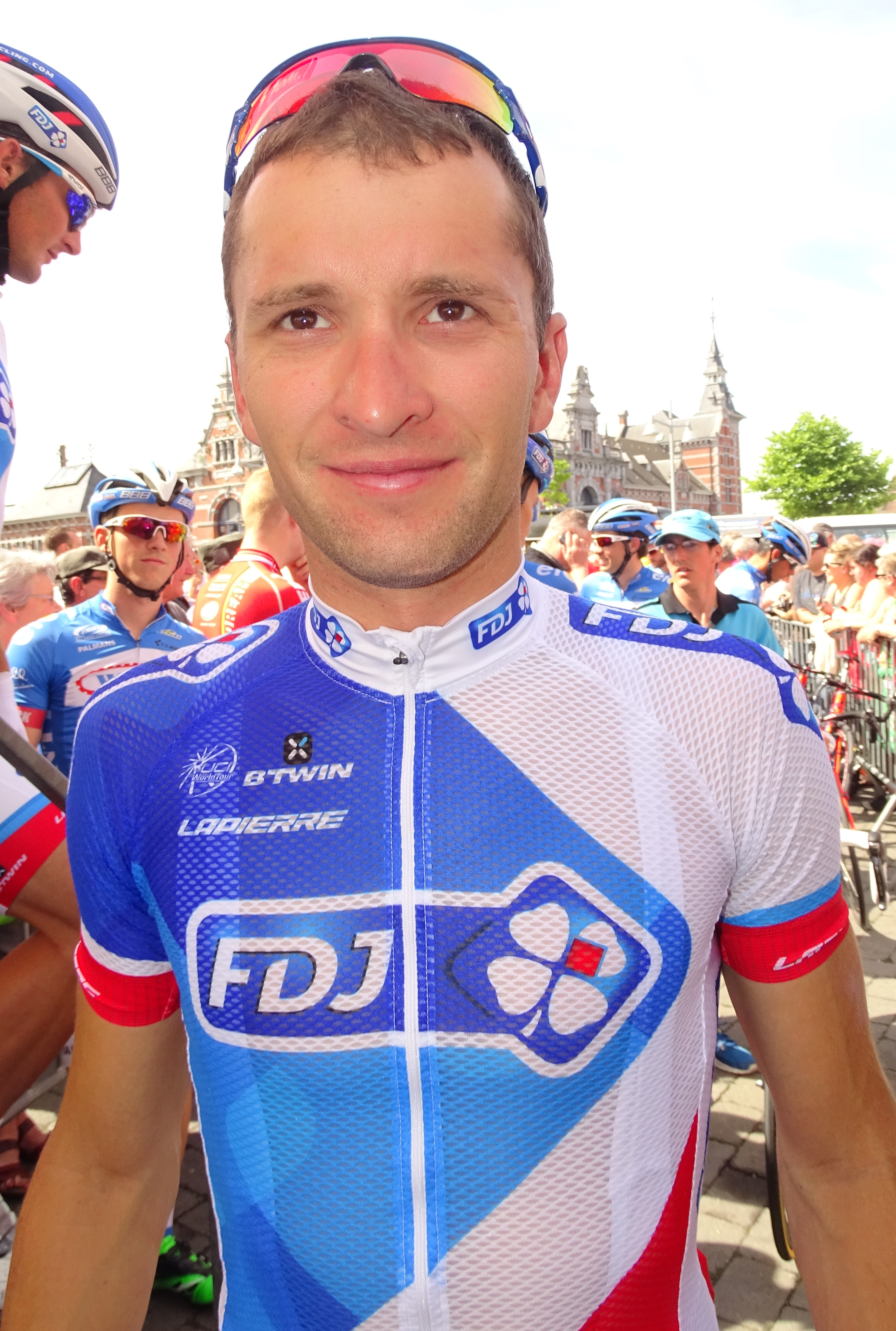 Reportage réalisé le mercredi 22 juillet à l'occasion du départ du Grand Prix Pino Cerami 2015 à Saint-Ghislain, Belgique.